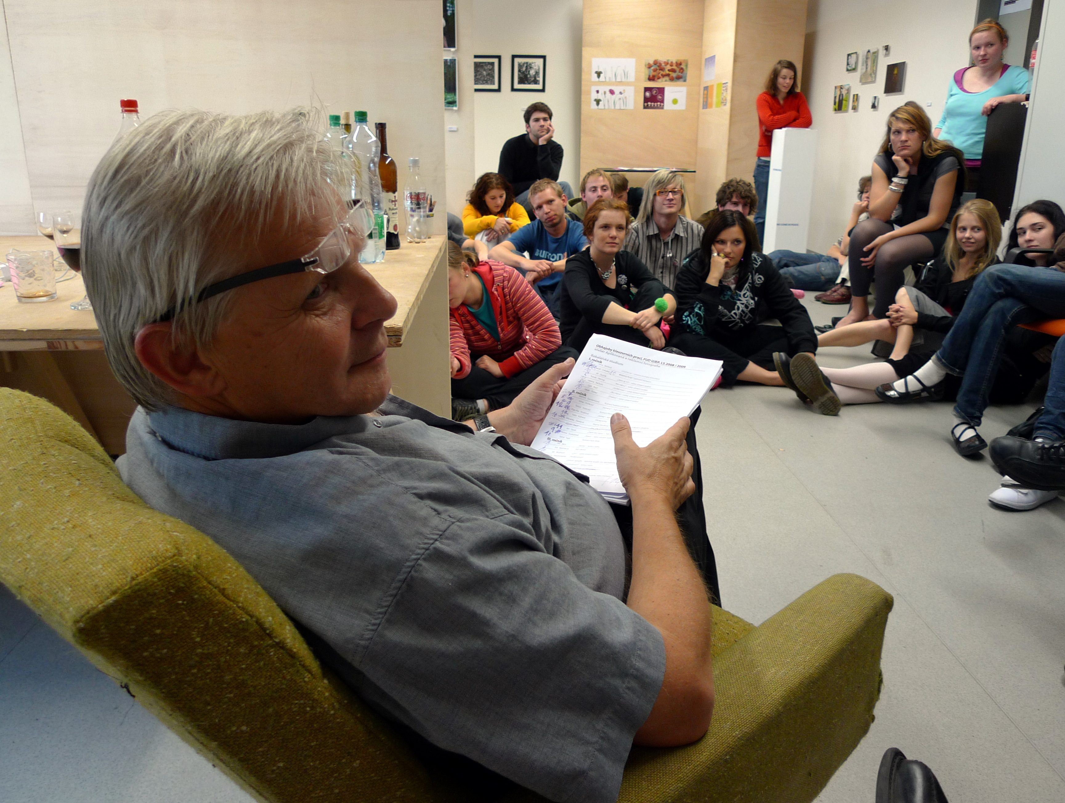 Prof. Vojtěchovský with students of UJEP Ústí nad Labem